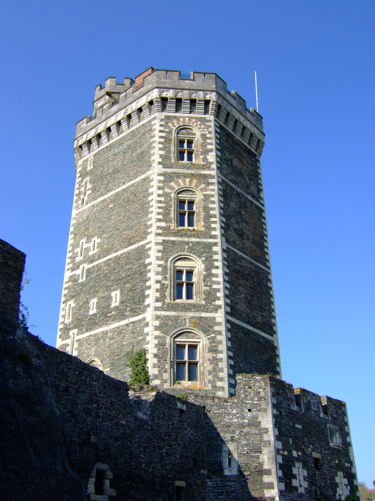 La tour à Oudon (Loire-Atlantique)